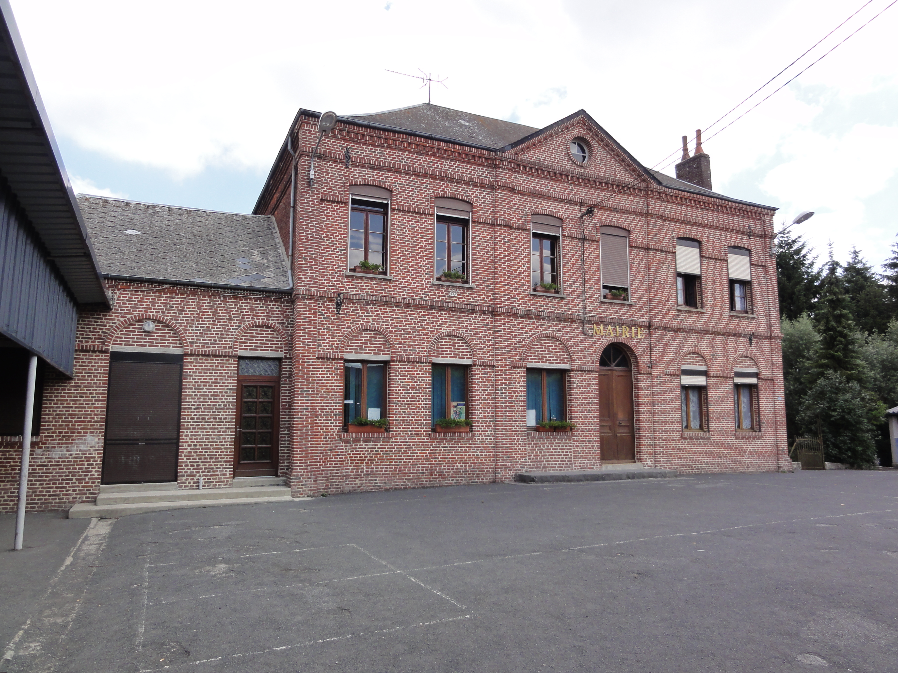 Barzy-en-Thiérache (Aisne, Fr) mairie